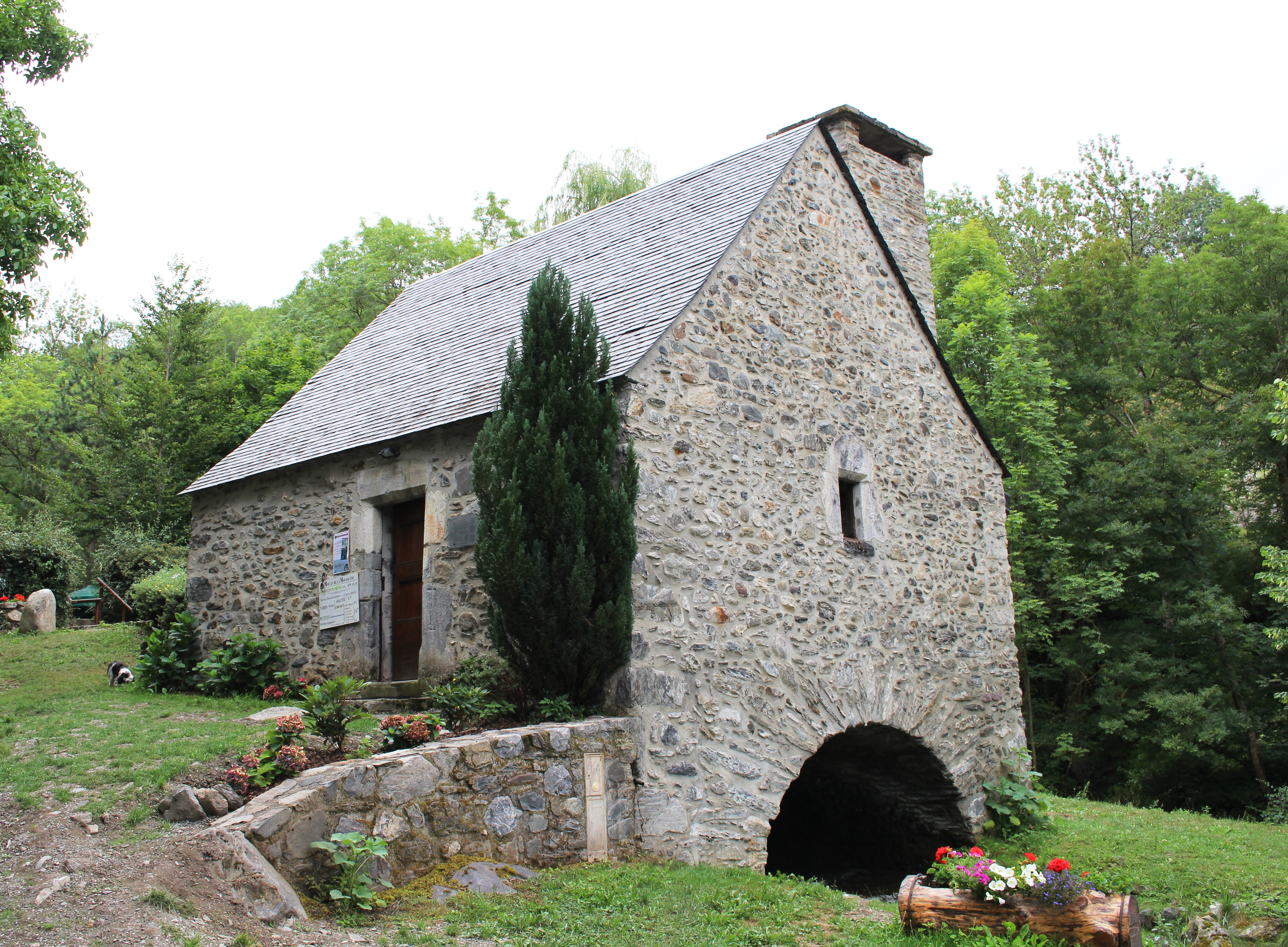 Moulin de La Mousquère, Sailhan (Hautes-Pyrénées)